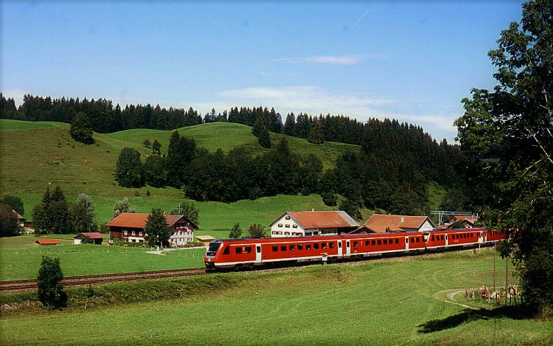 Triebzug der Baureihe 612 auf der Allgäubahn bei Harbatshofen